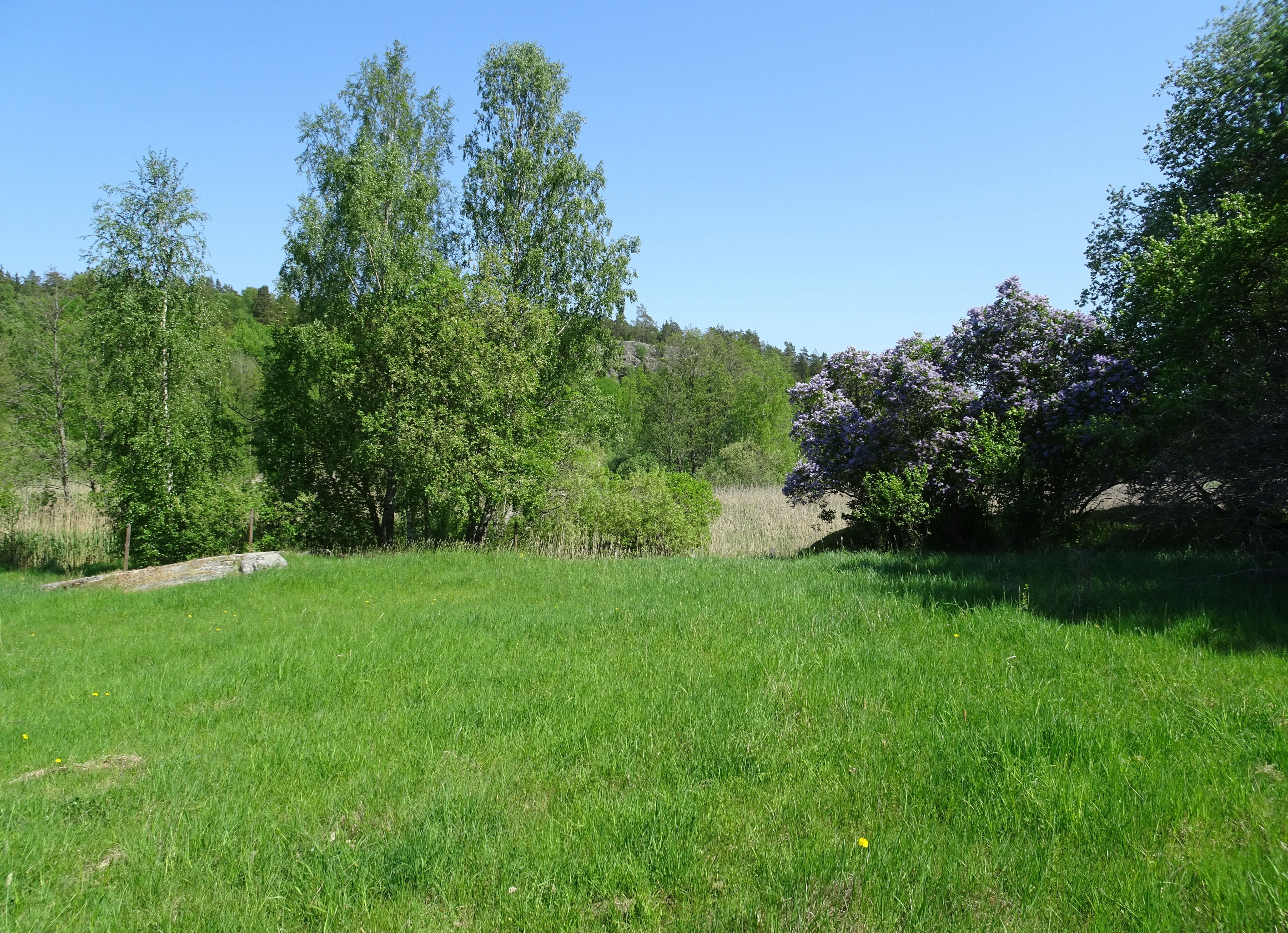 Platsen för den numera försvunna Brostugan vid Flemingsbergsviken